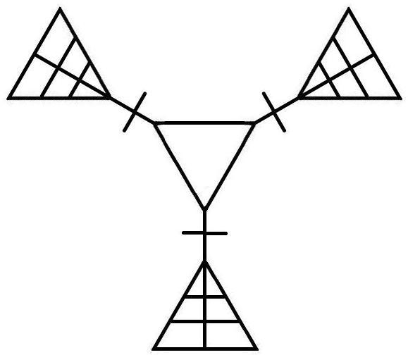 中文（台灣）: 爭三國棋盤